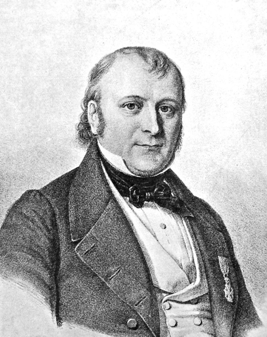 Joakim Frederik Schouw, (7. februar 1789 i København - 28. april 1852), var botaniker og politiker.